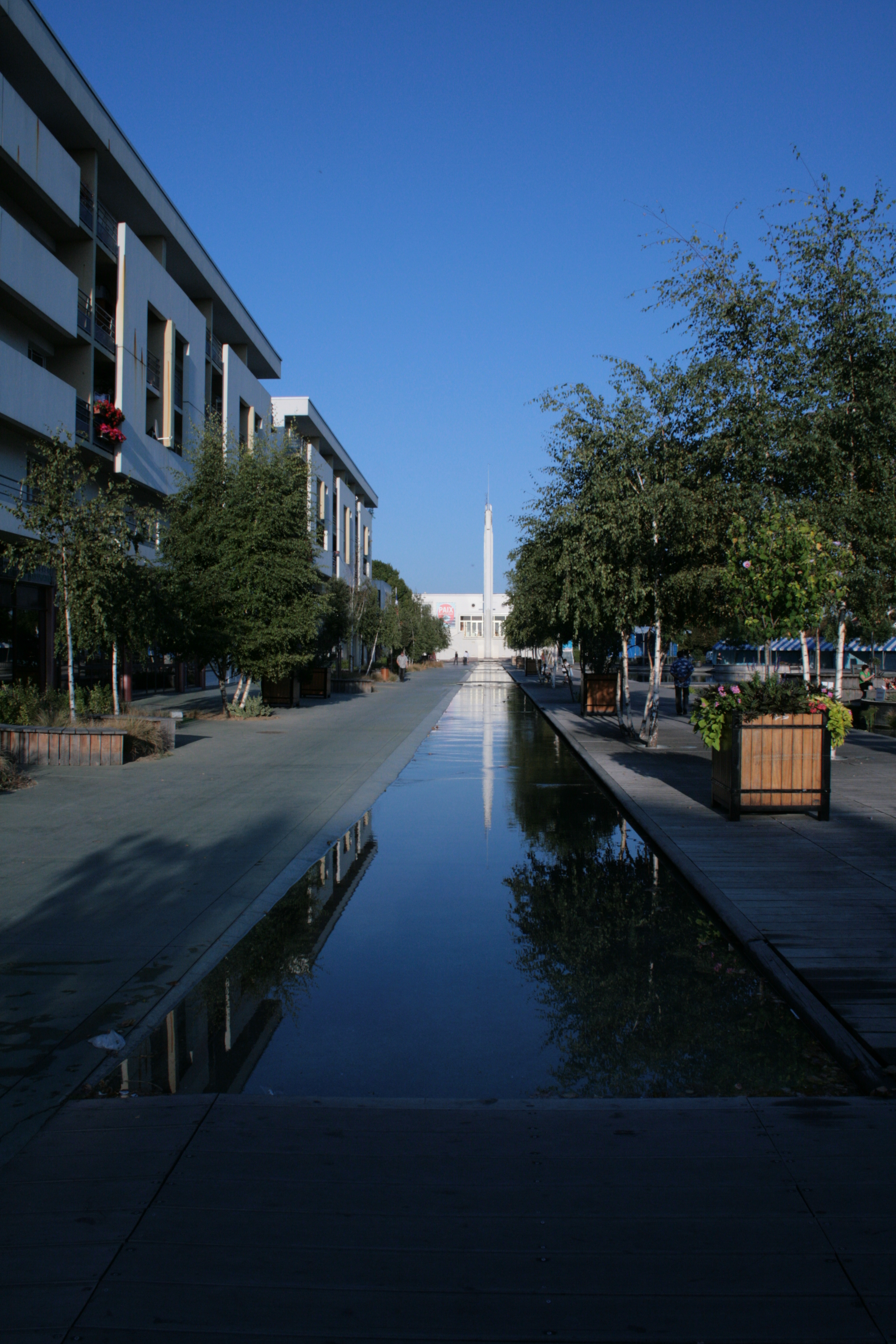 La Place de l'eau et la flèche de l'Hôtel de ville